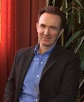 Photographie en couleur de Franck Bondoux